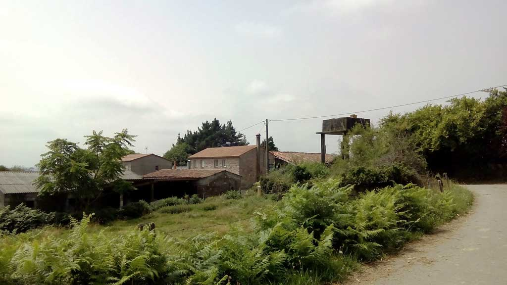 Vista de Mirás, Curtis